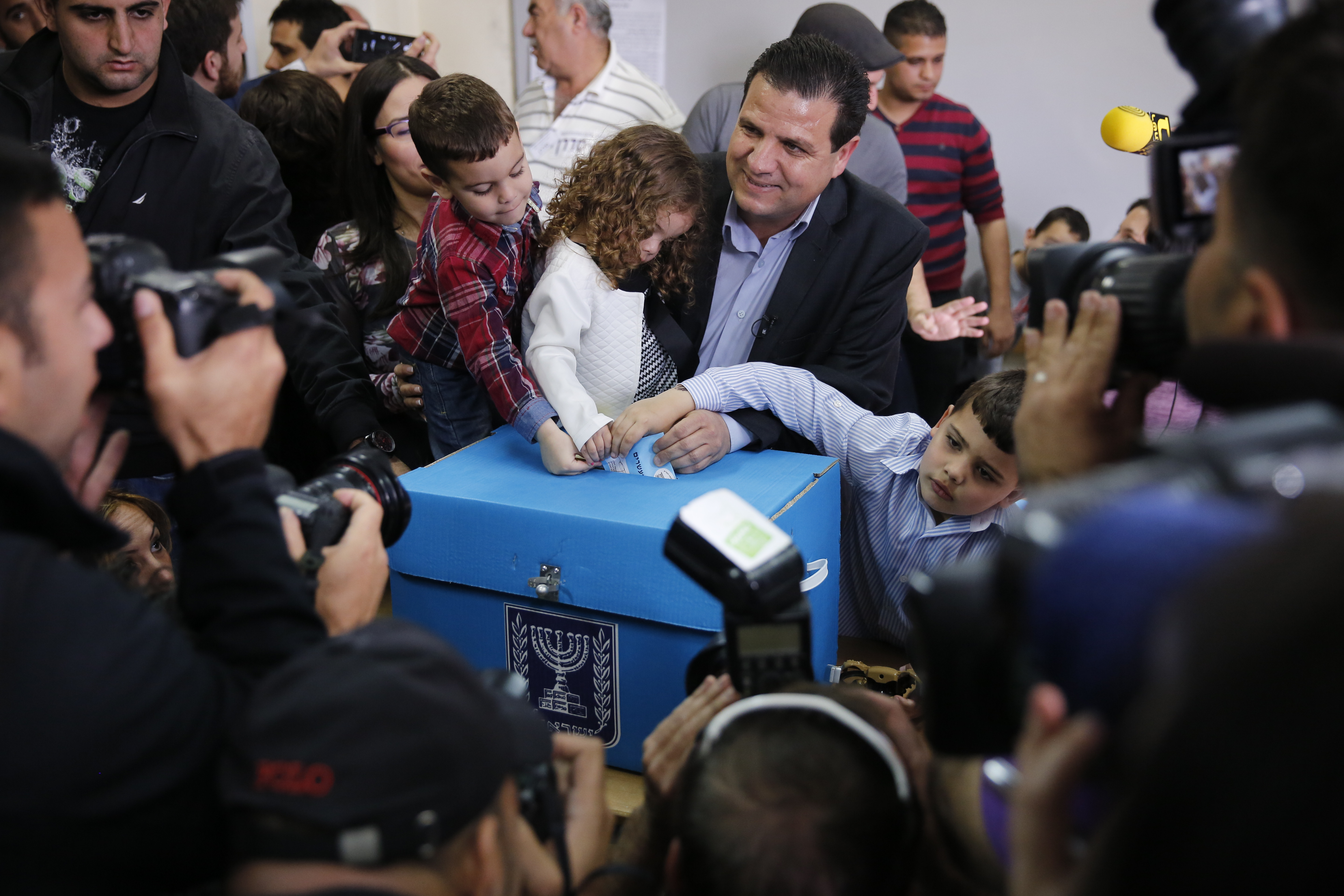 איימן עודה מצביע בבחיות לכנסת ה-20